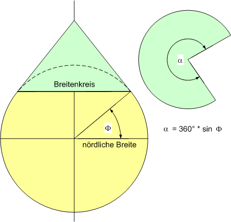 Herleitung der Drehgeschwindigkeit der Erdoberfläche in Abhängigkeit von der geographischen Breite.